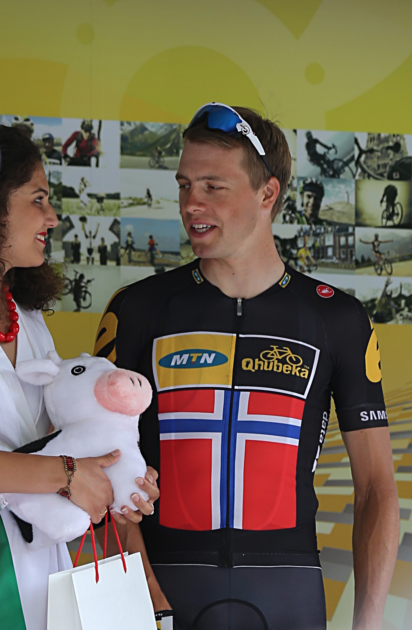 Edvald Boasson Hagen lors du départ de la 8e étape du Tour de France 2015 à Rennes.